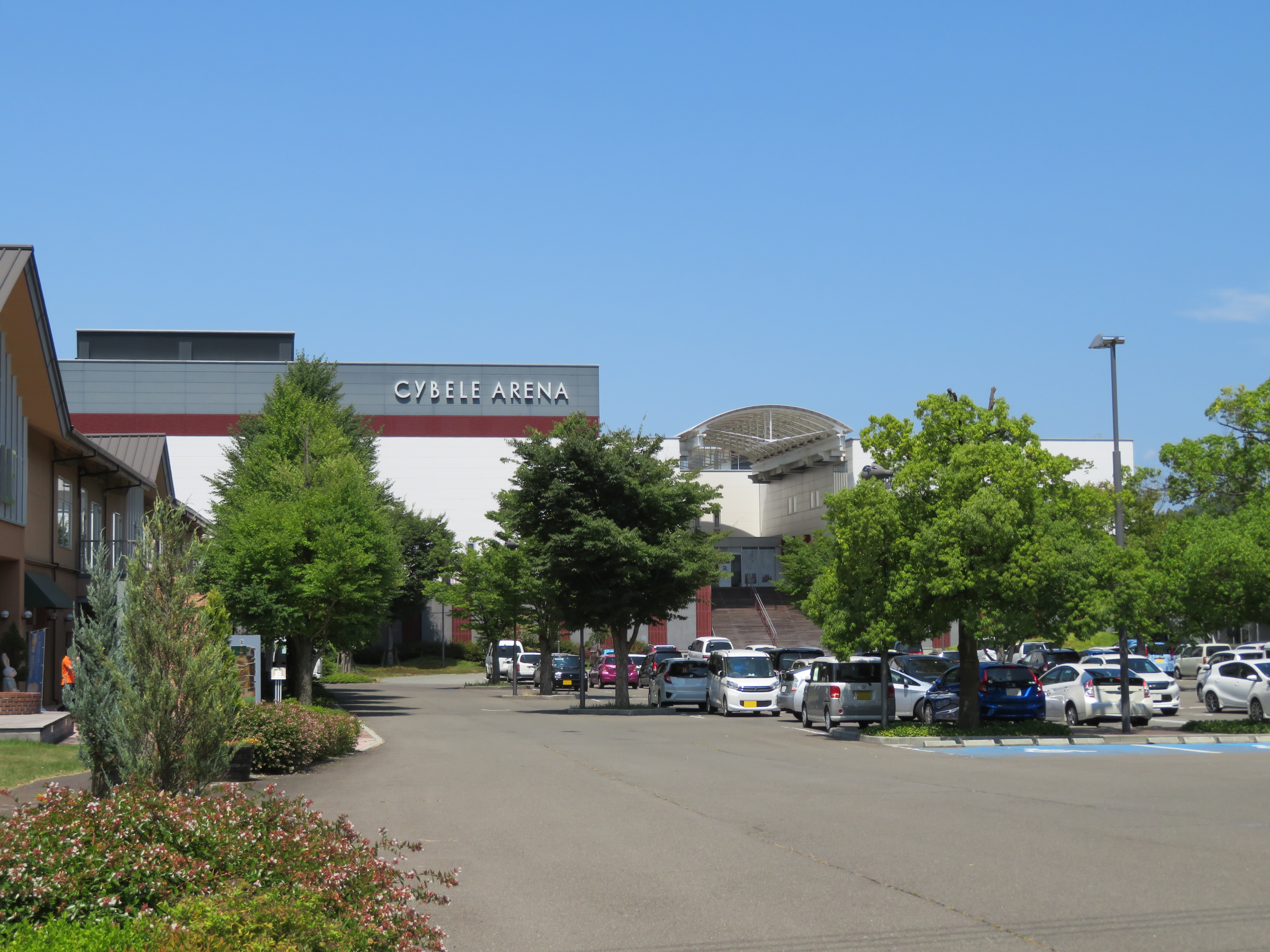 山形市に所在するシベールアリーナ Canon PowerShot SX720 HS